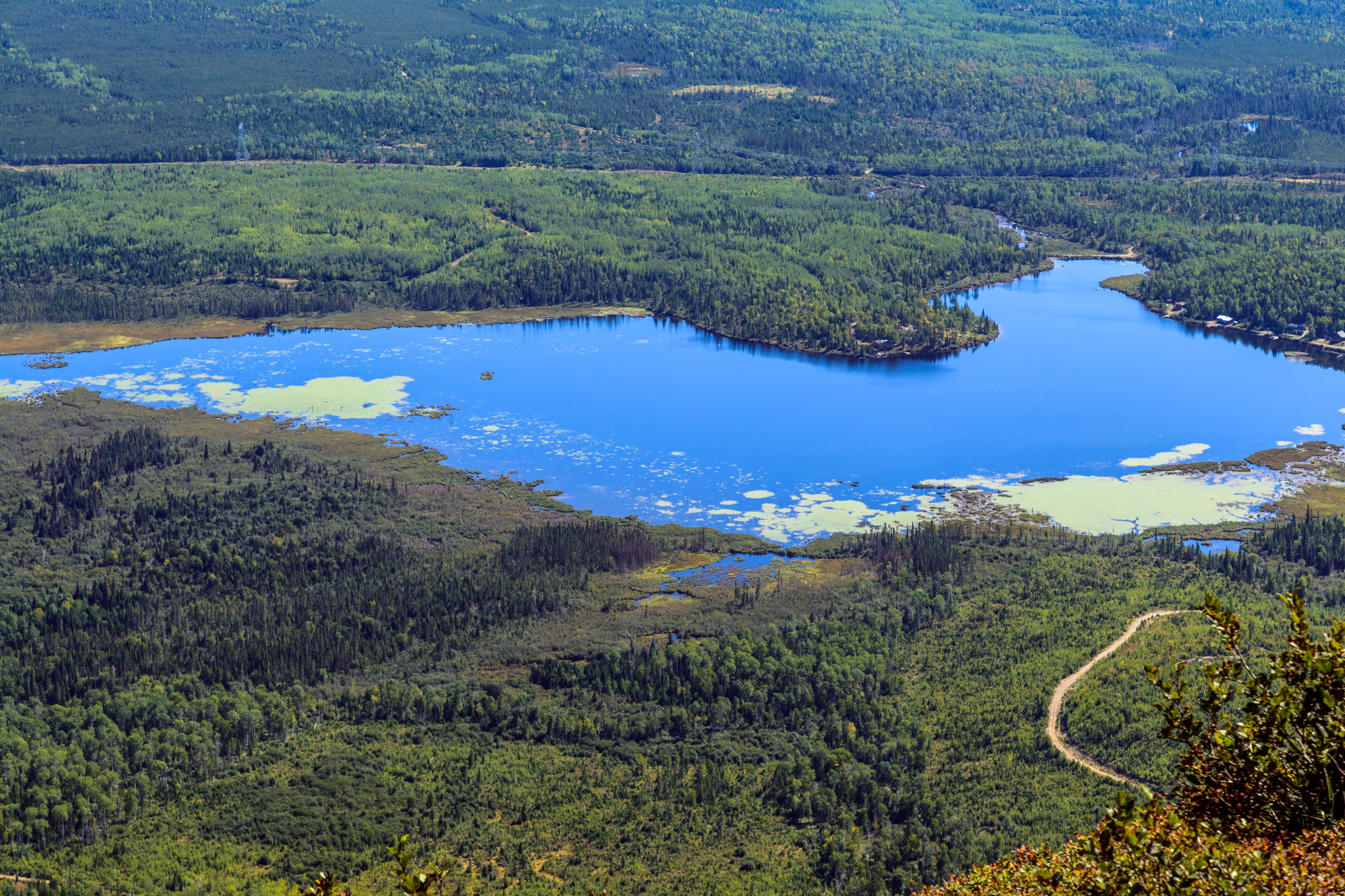 Parc national des Grands-Jardins, Canada